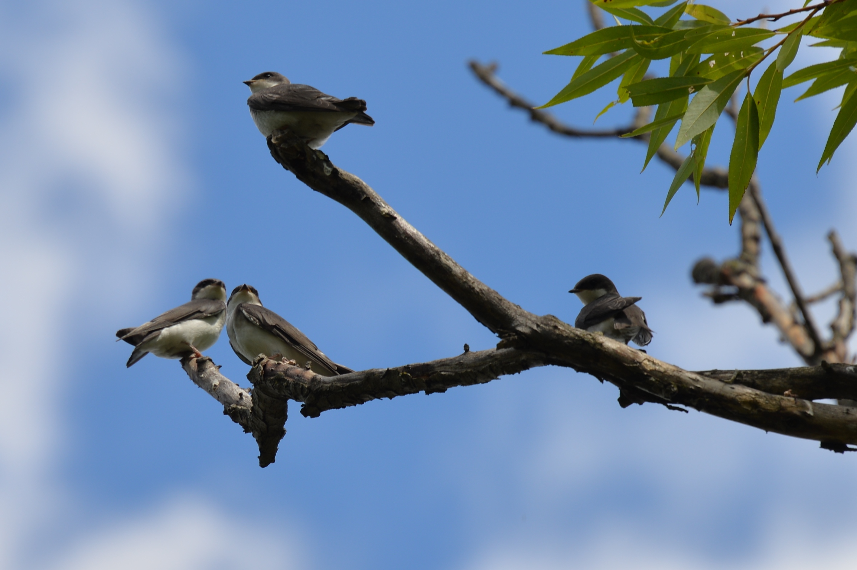 Молоді птахи білозорки річкової (Tachycineta bicolor) вчаться літати на ставку Topham Pond у Торонто